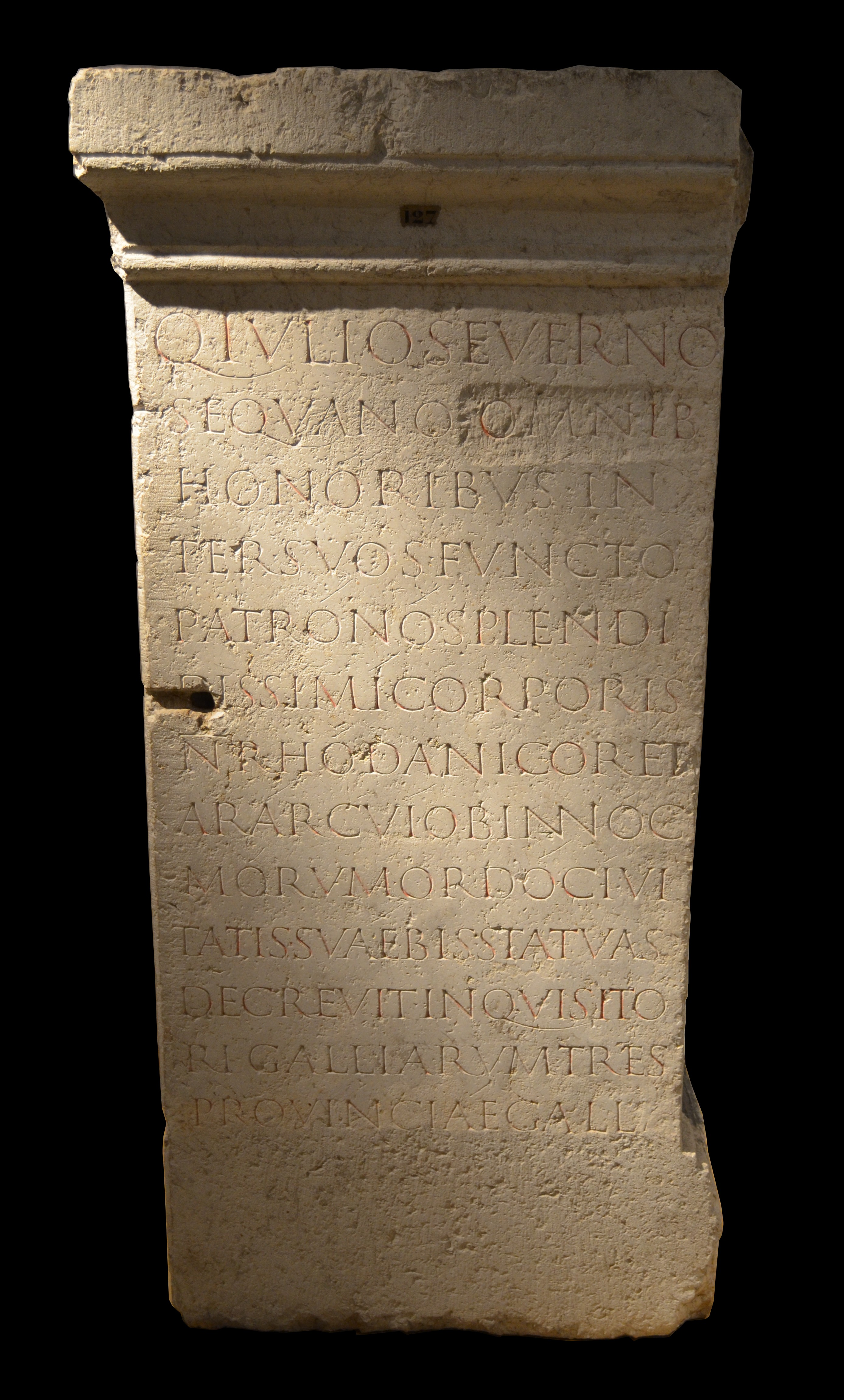 Musée gallo-romain de Fourvière (Lyon) - Piédestal de statue remployé comme support gauche de l'autel de l'église de Saint-Pierre-les-Nonains à Lyon jusqu'en 1824 : Q(uinto) Iulio Severino, / Sequano [omnib(us)] / honoribus in/ter suos functo / patrono splendi/dissimi corporis / n(autarum) Rhodanicor(um) et Arar(icorum), cui ob innoc(entiam)/morum ordo civi/tatis suae bis statuas / decrevit inquisito/ri Galliarum, tres / provinciae Gall(iae) : A Quintus Julius Severinus, Séquane, promu dans sa cité à tous les honneurs, patron de la splendidissime corporation des bateliers du Rhône et de la Saône, honoré deux fois de statues en témoignage de son intégrité par le Conseil des décurions de sa cité, inquisiteur des Gaules, les Trois provinces des Gaules (ont élevé cette statue).